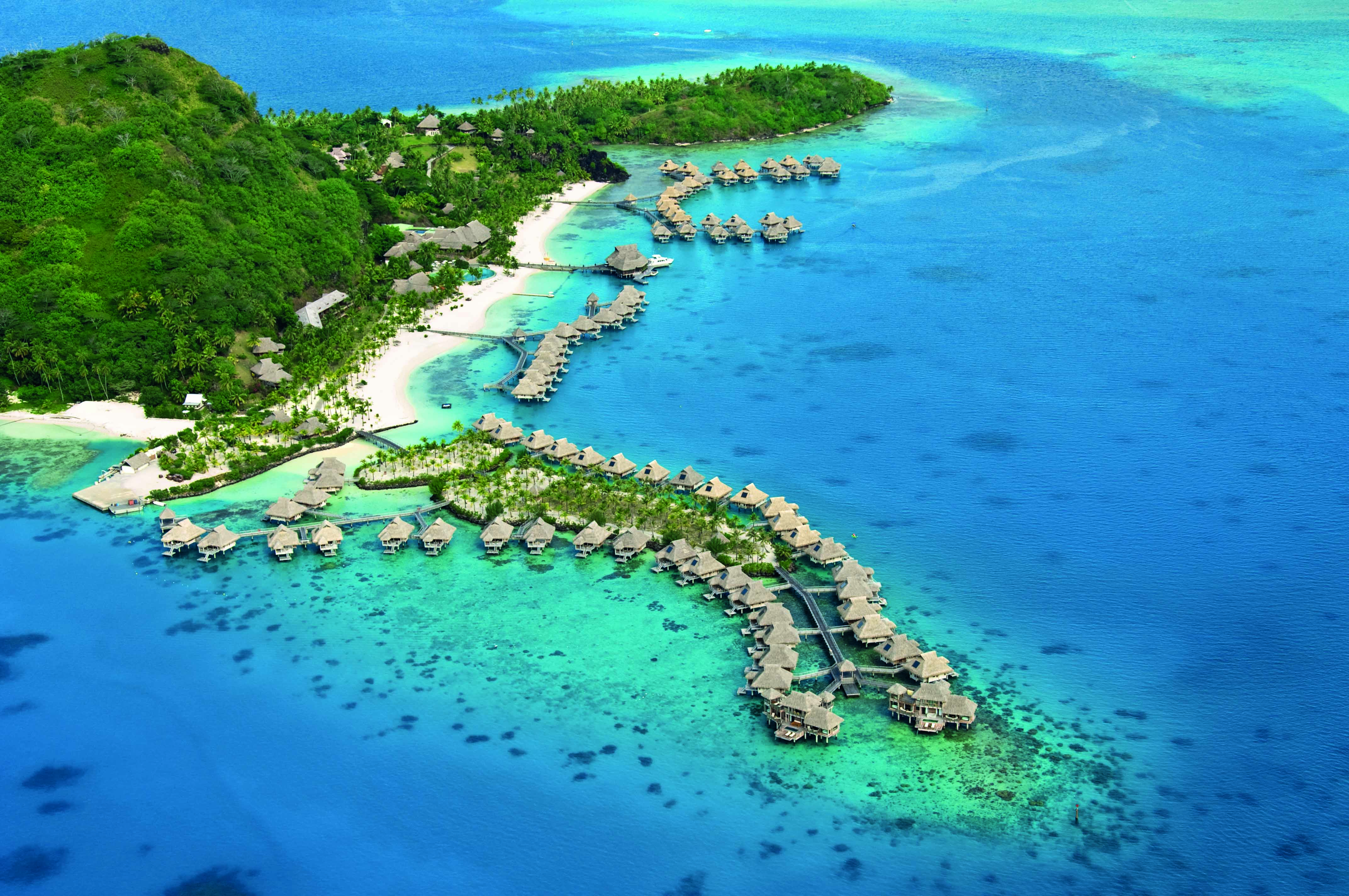 BORA BORA POLINESIA FRANCESA_By Mauro Soares